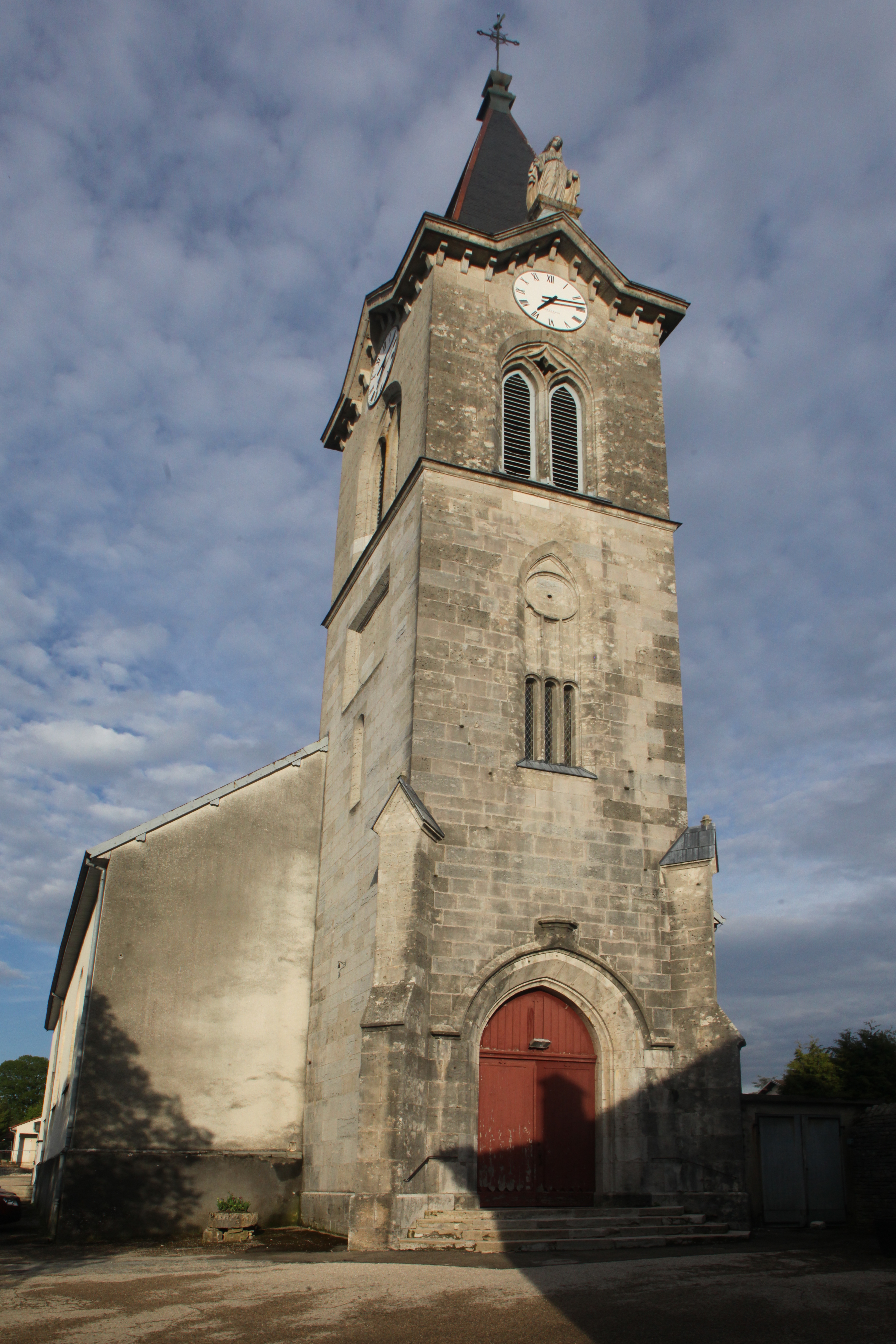 Église d'Amancey (Doubs).